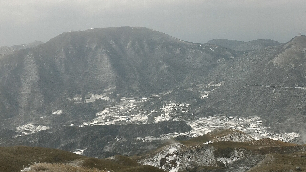 下雪一夜後的大屯山及山下竹子湖,拍攝地點於七星山主峰。(原圖裁切)